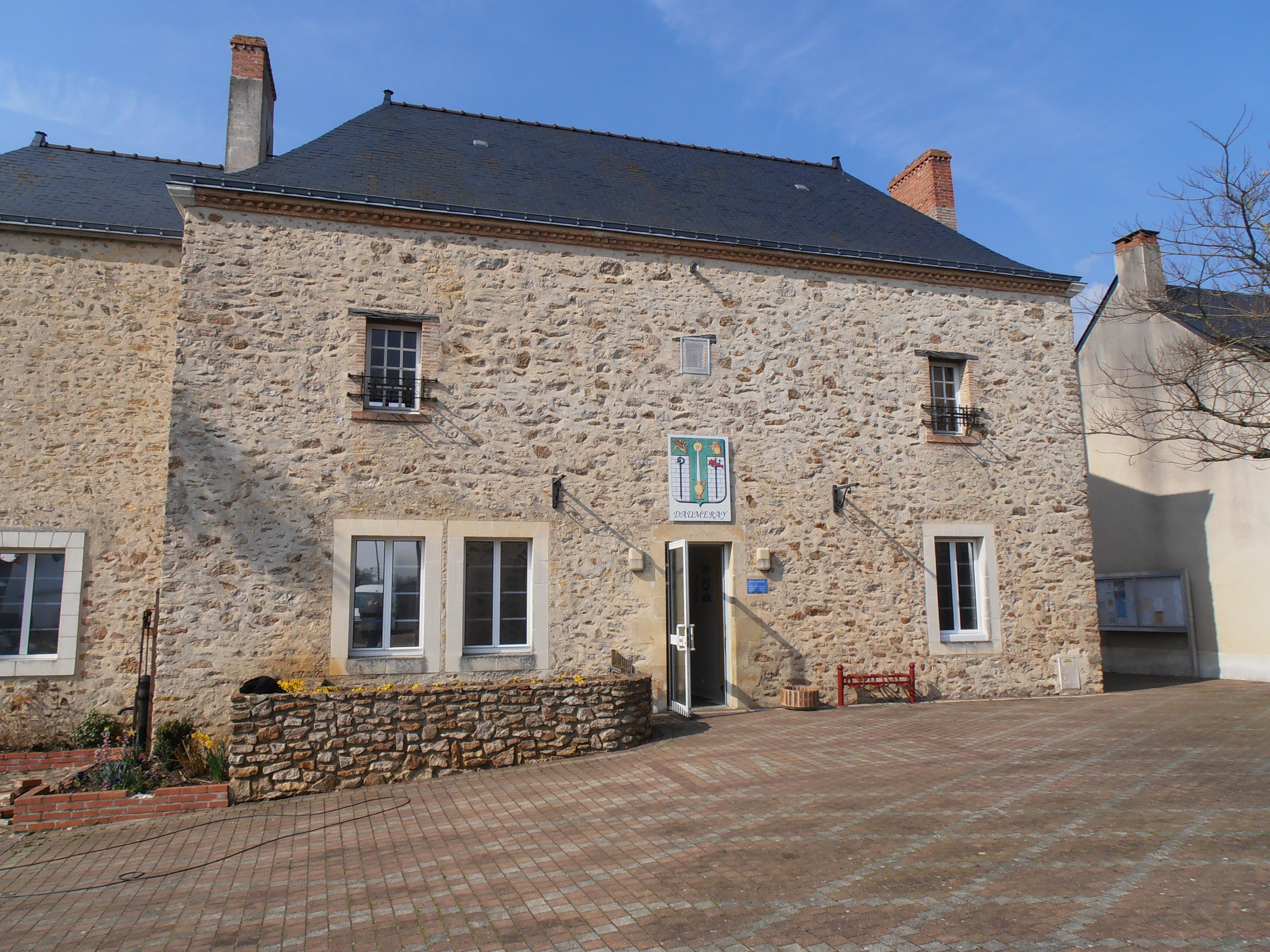 La mairie de Daumeray